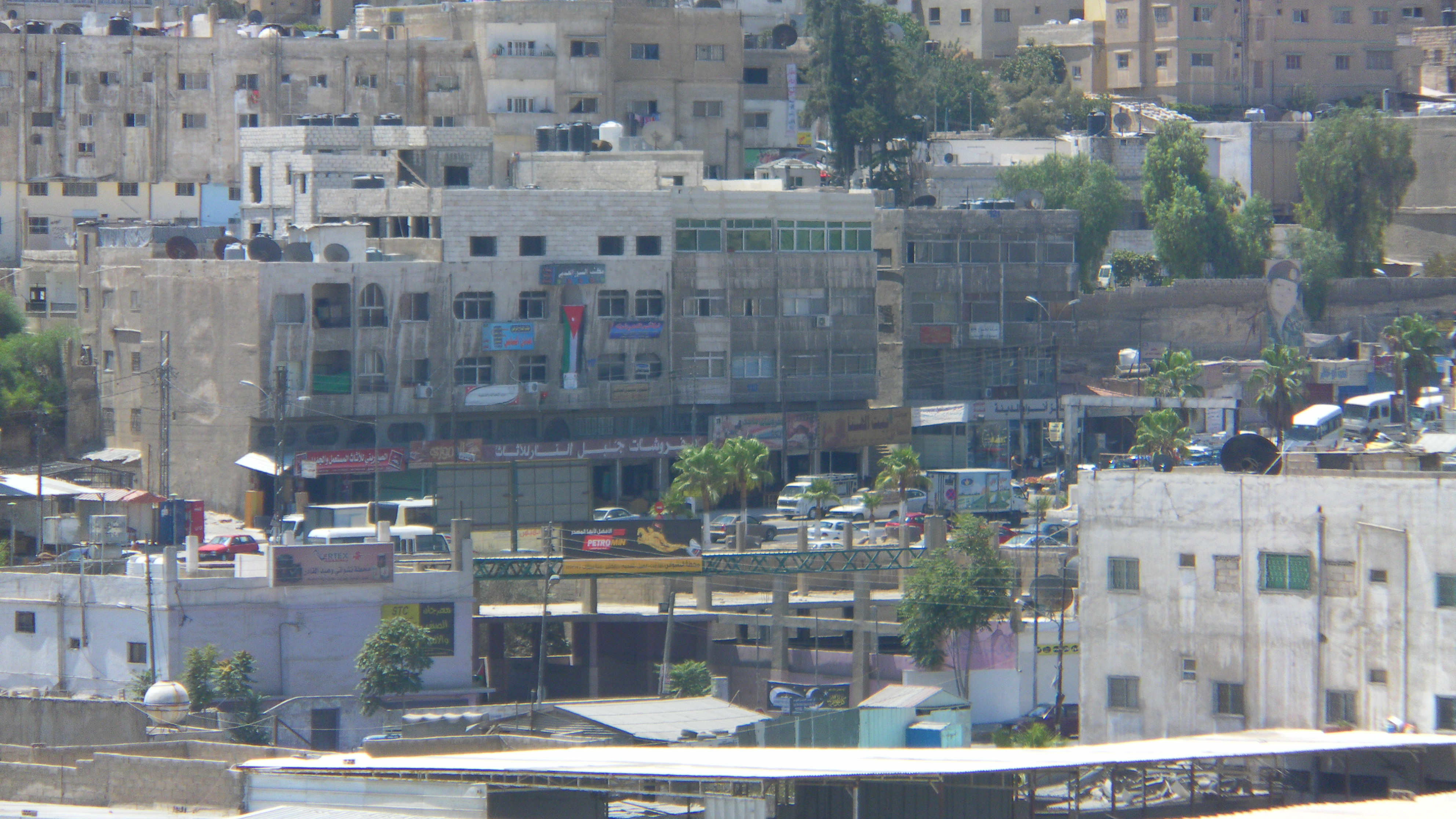 منظر من الجبل الجنوبي في الرصيفة, الزرقاء، الأردن